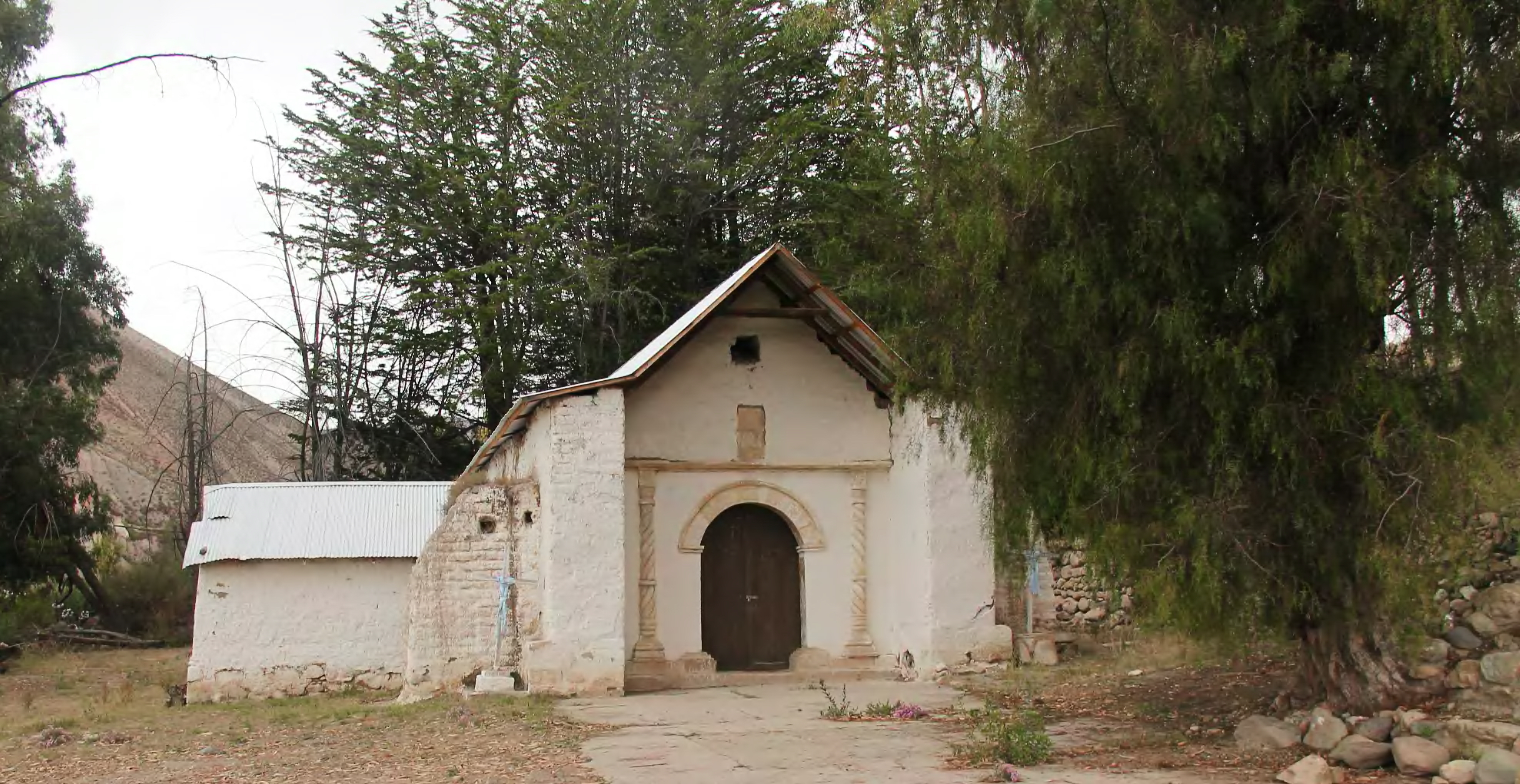 Iglesia de la Virgen de la Asunción de Ticnámar This is a photo of a national monument in Chile: 2229